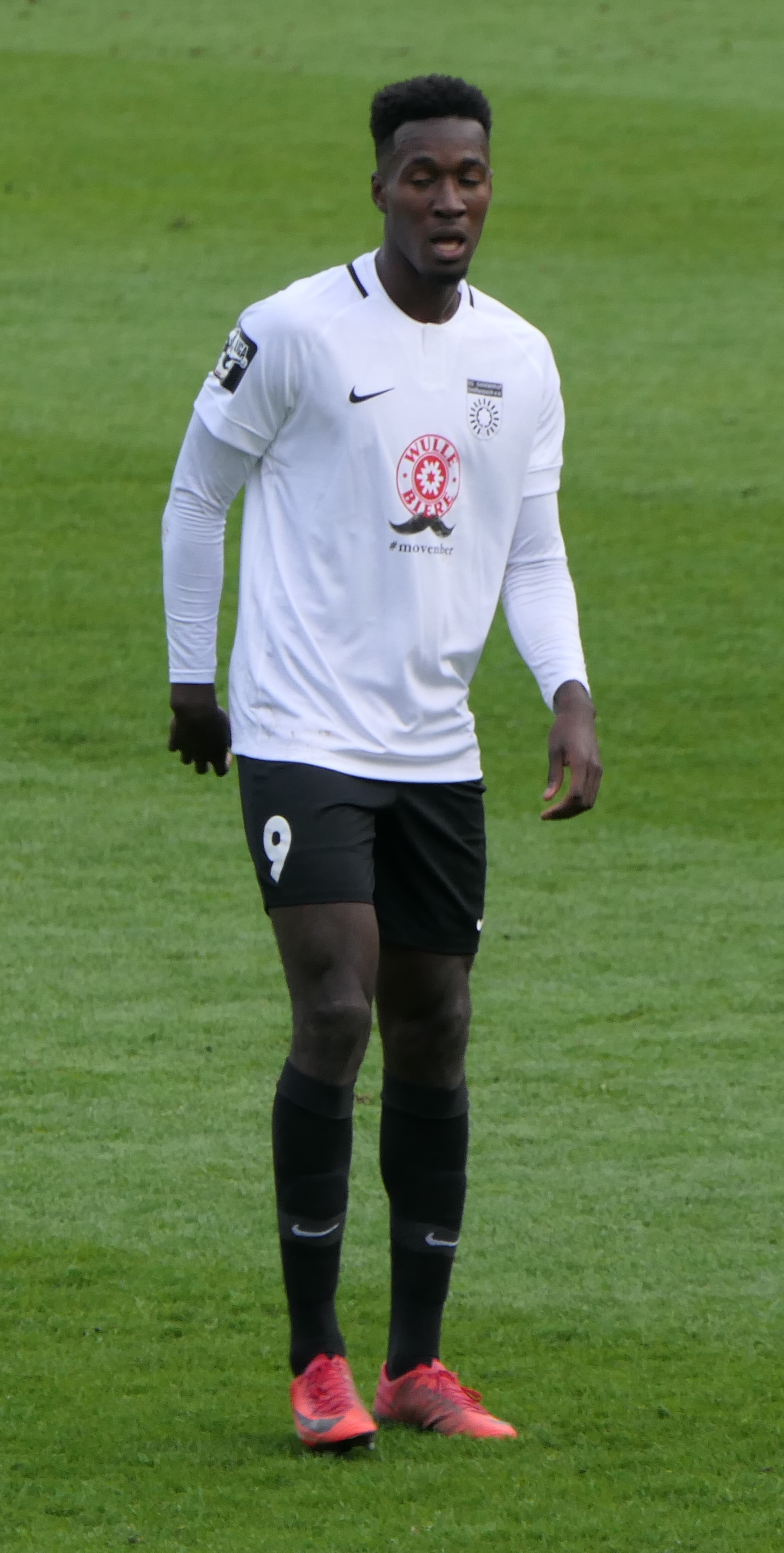 Der Fussballprofi Mike Owusu im Trikot der SG Sonnenhof Großaspach beim Heimspiel gegen Eintracht Braunschweig am 03.11.2018.